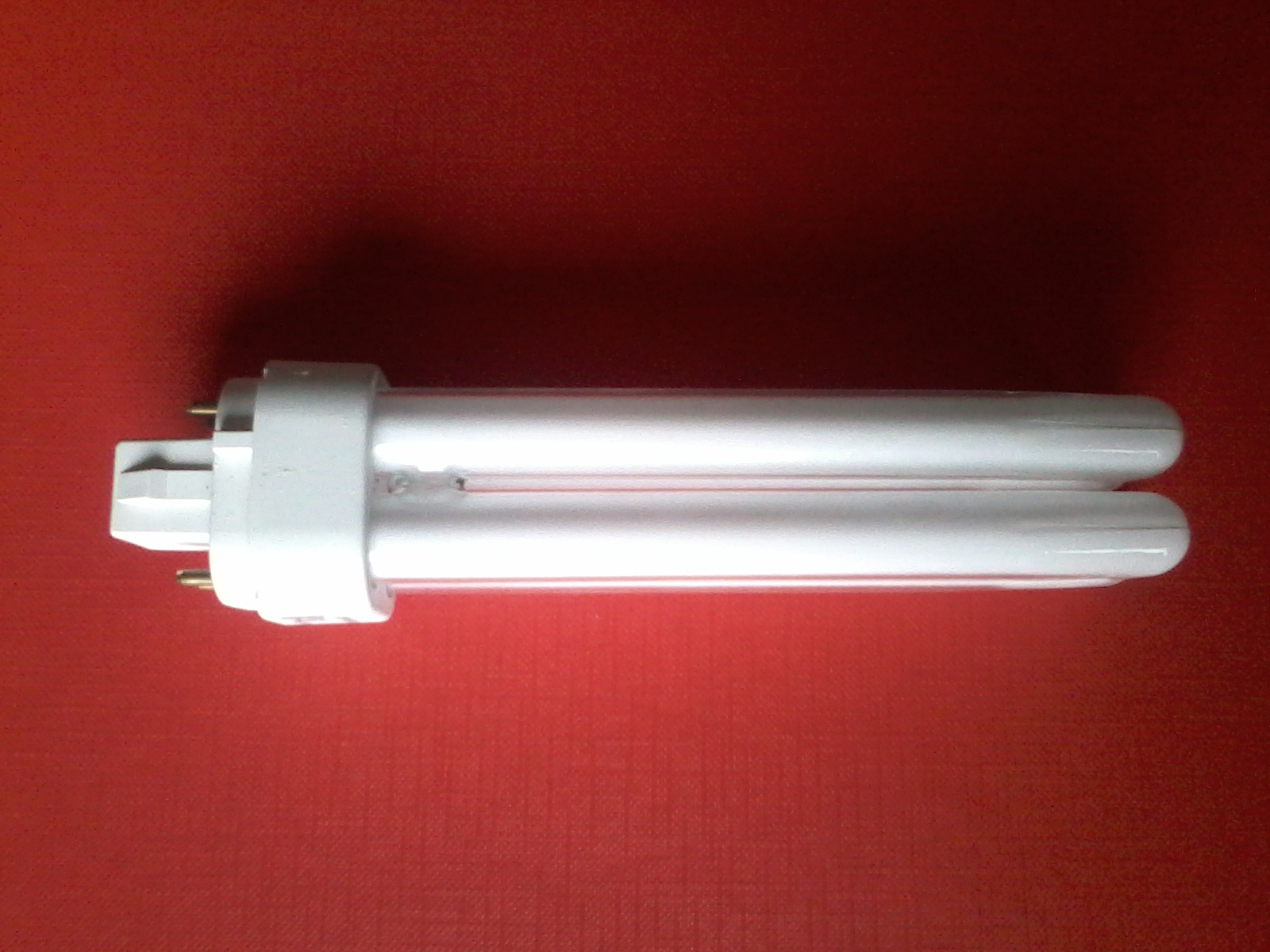 Знято мобілкою Самсунг